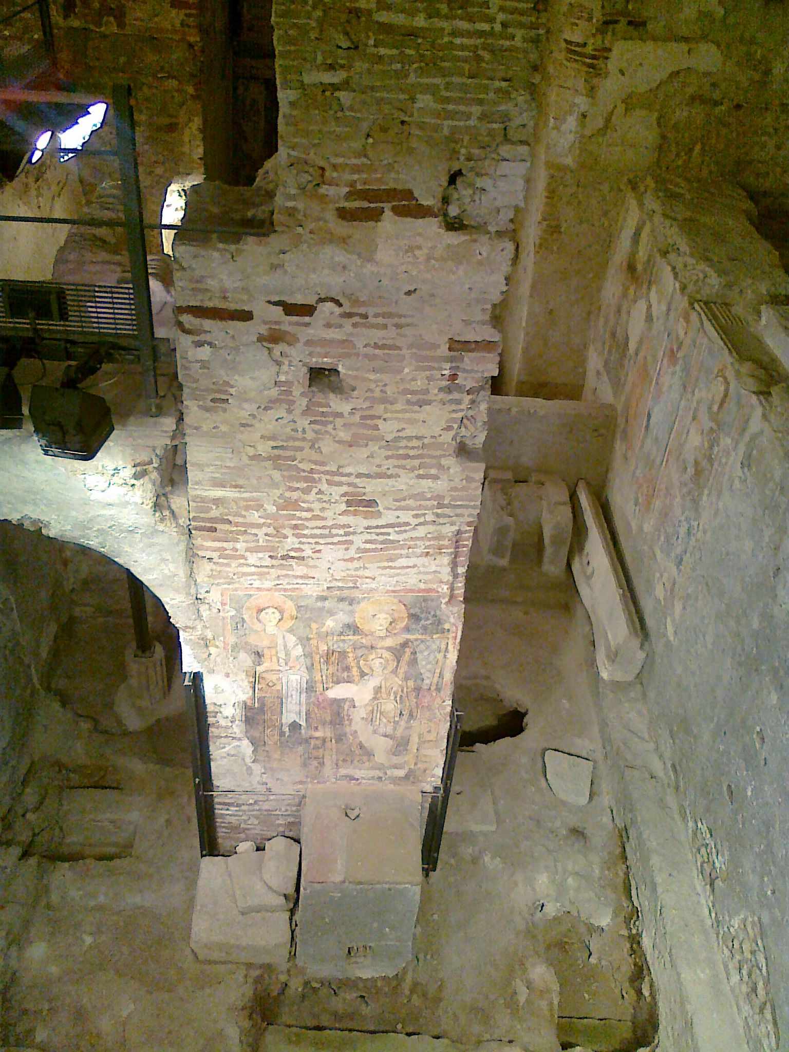 Ipogeo della complesso monumentale di san Pietro a Corte, a Salerno.